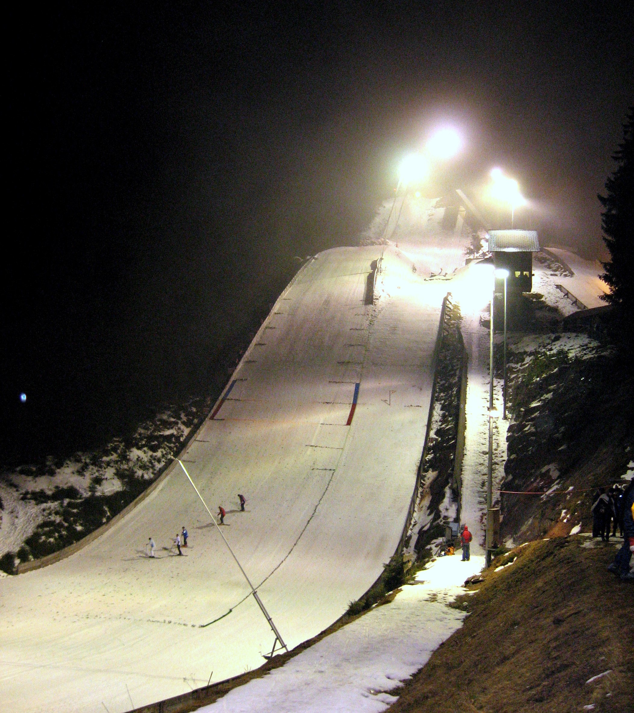 Ski jumping hill "Ruhesteinschanze", Baiersbronn, Germany